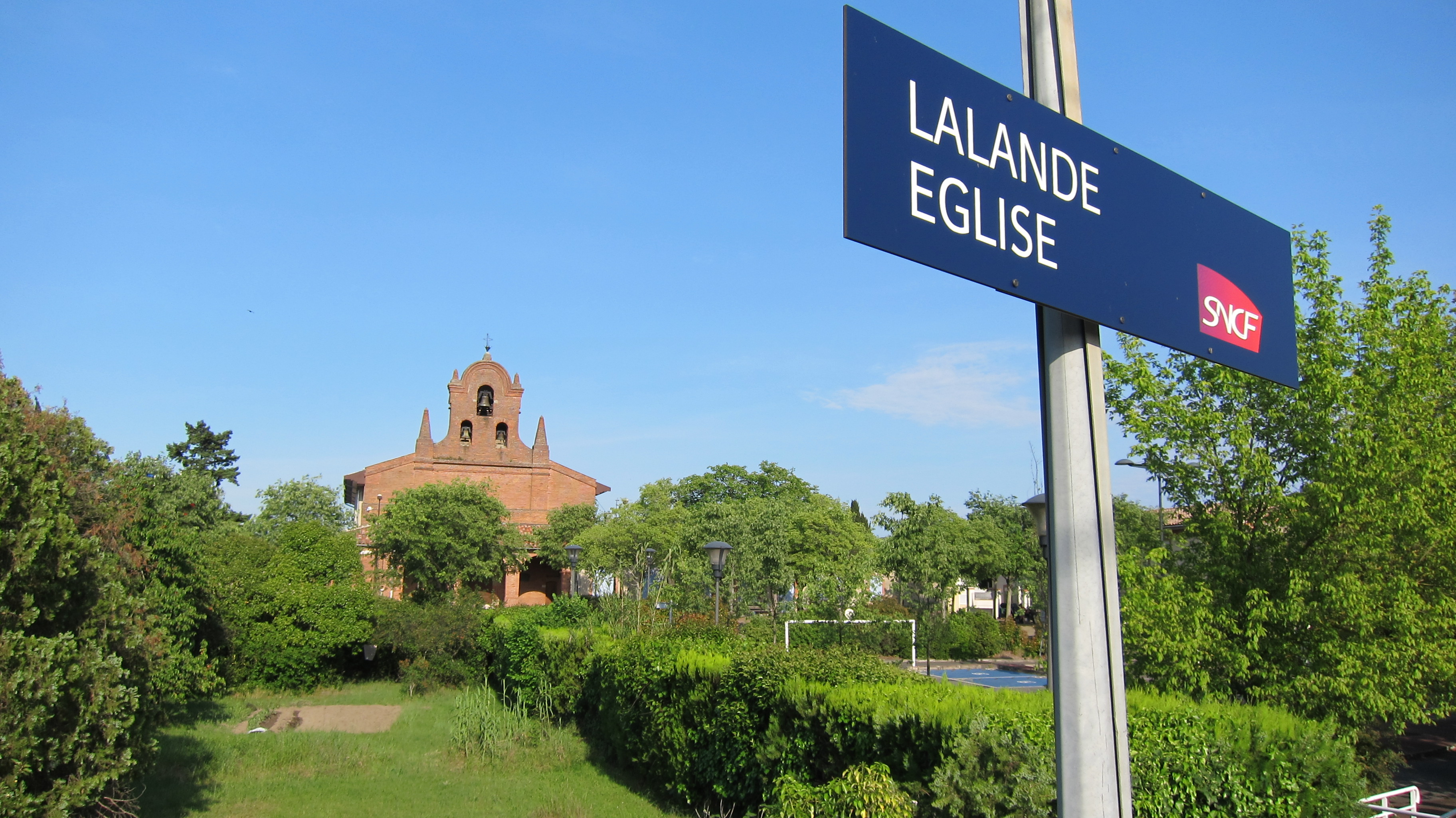 Toulouse (Haute-Garonne, Midi-Pyrénées, France) : Gare de Lalande-Église à Lalande.